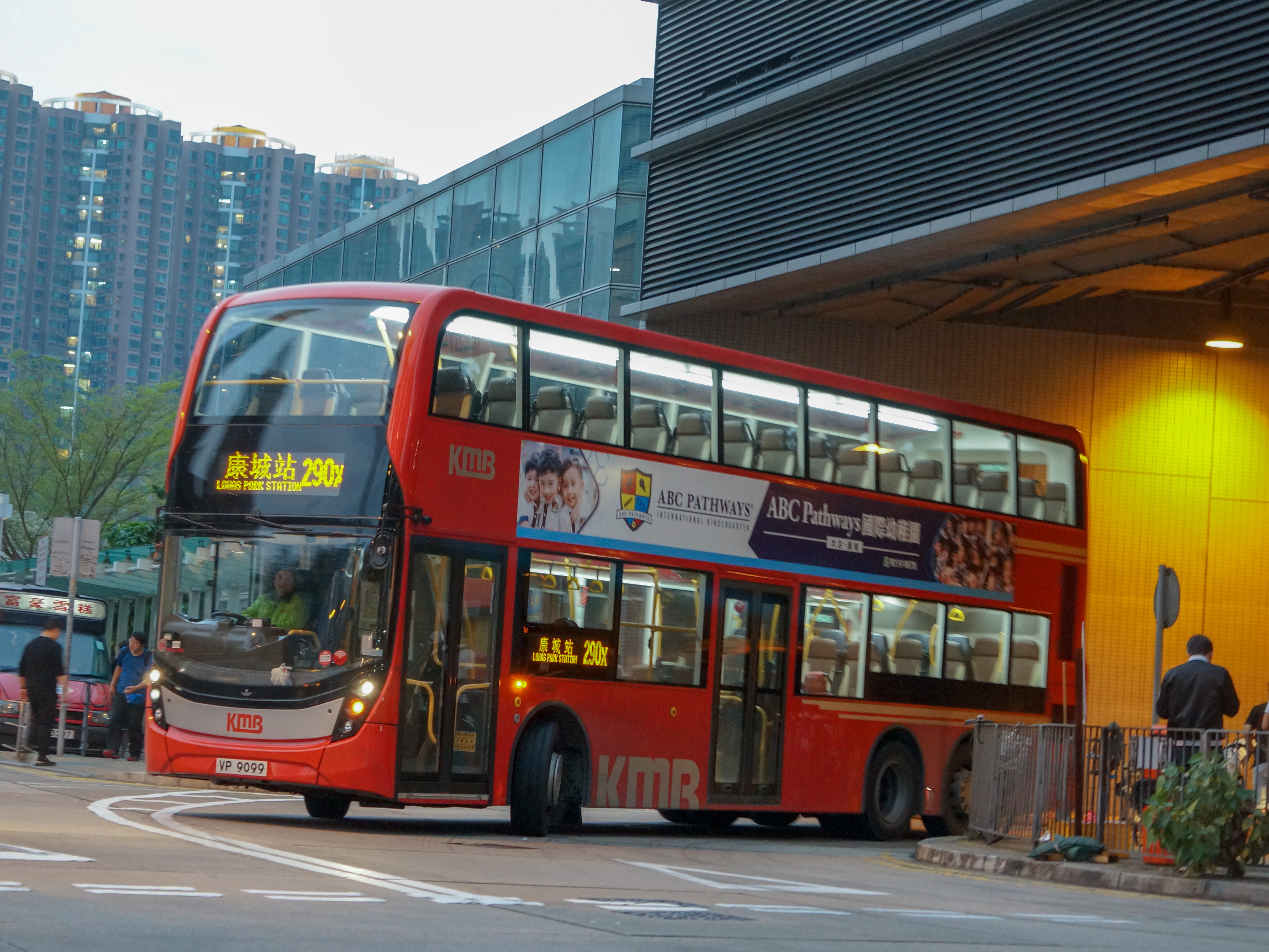 九龍巴士290X線